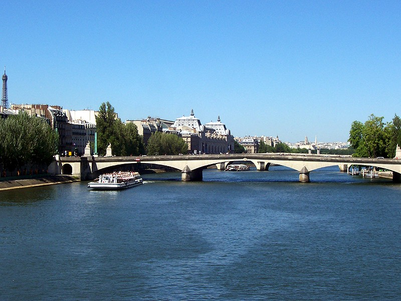 Parigi - Fiume Senna visto dal Pont des Arts